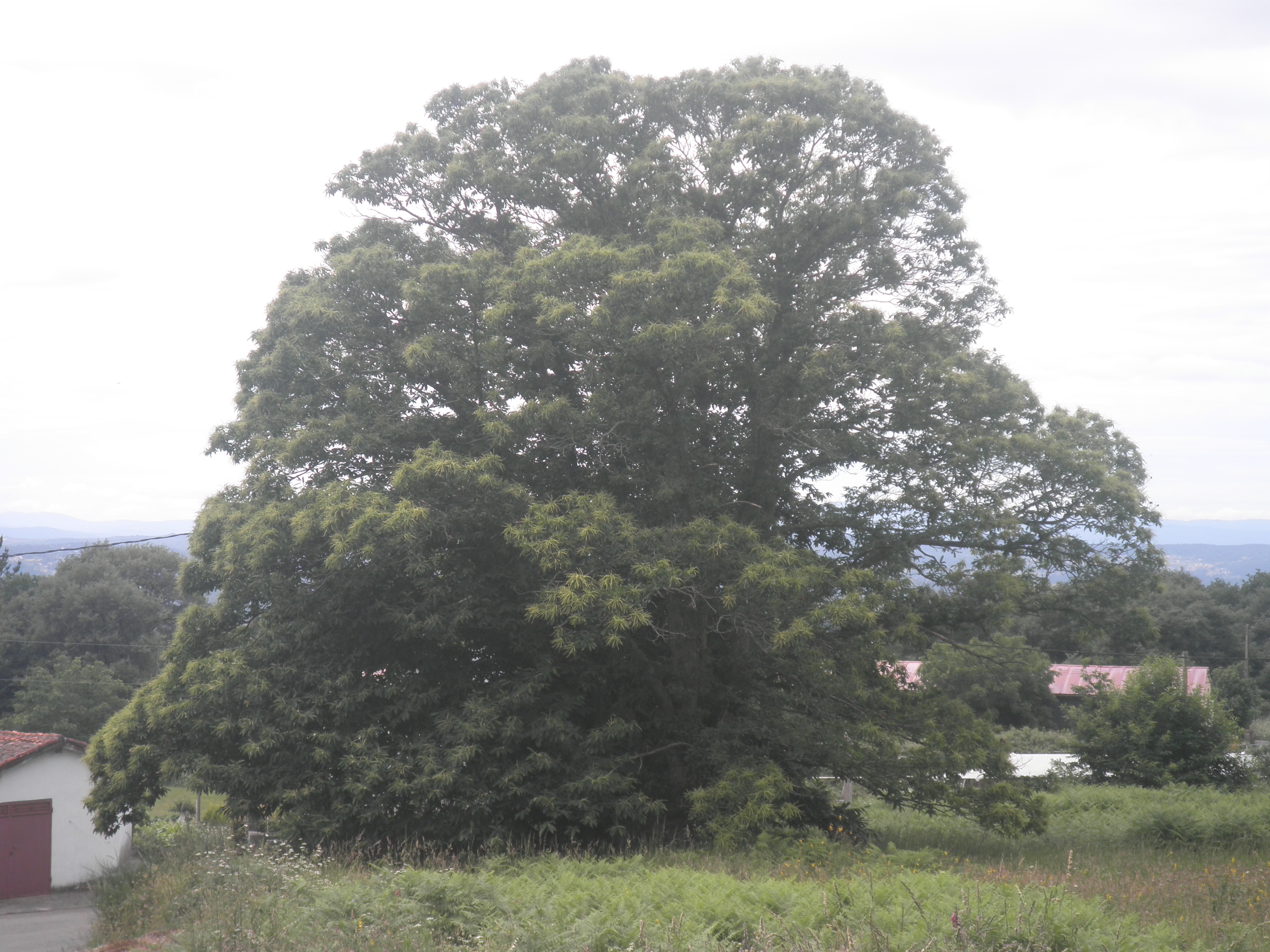 ÁRBOL MILENARIO